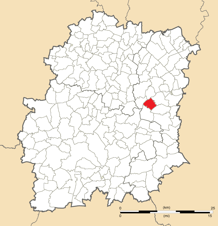 Carte de position de Fontenay-le-Vicomte en Essonne (91)